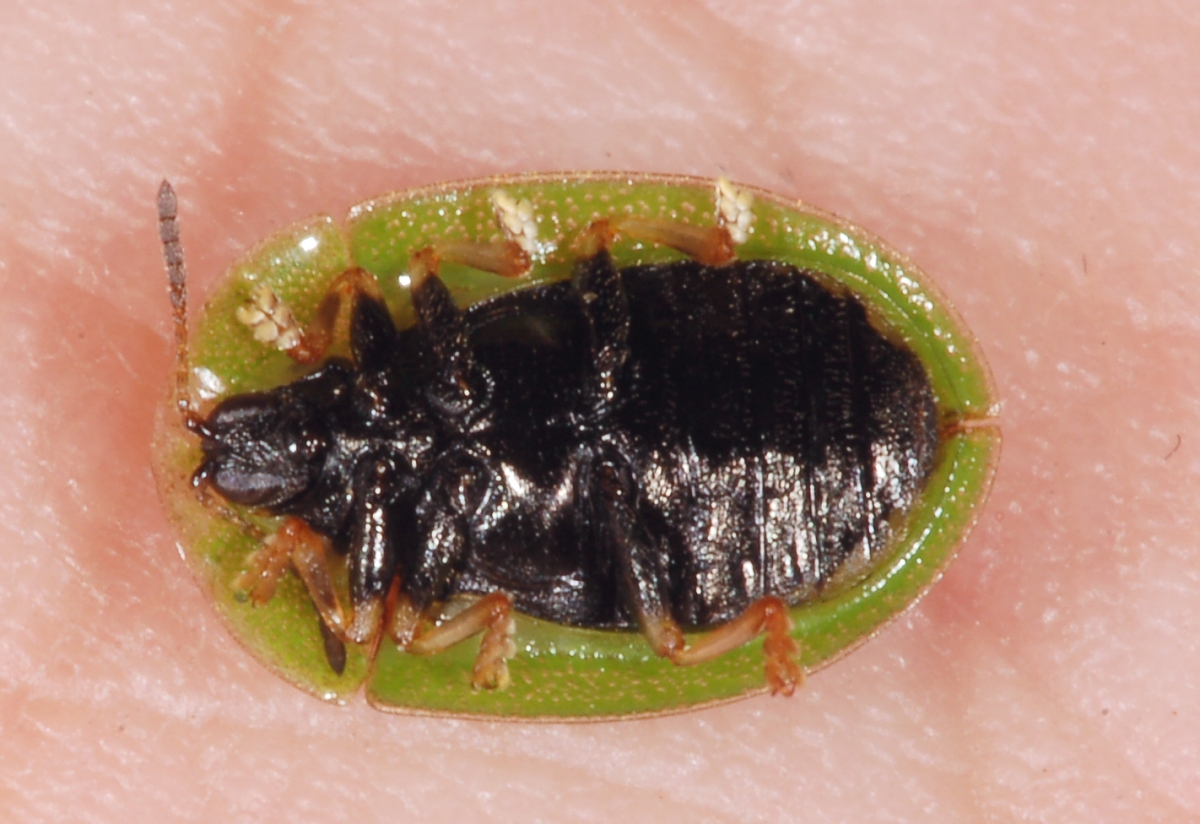 Cassida spec., Selzerbrunnen, Nied, Frankfurt am Main, Deutschland